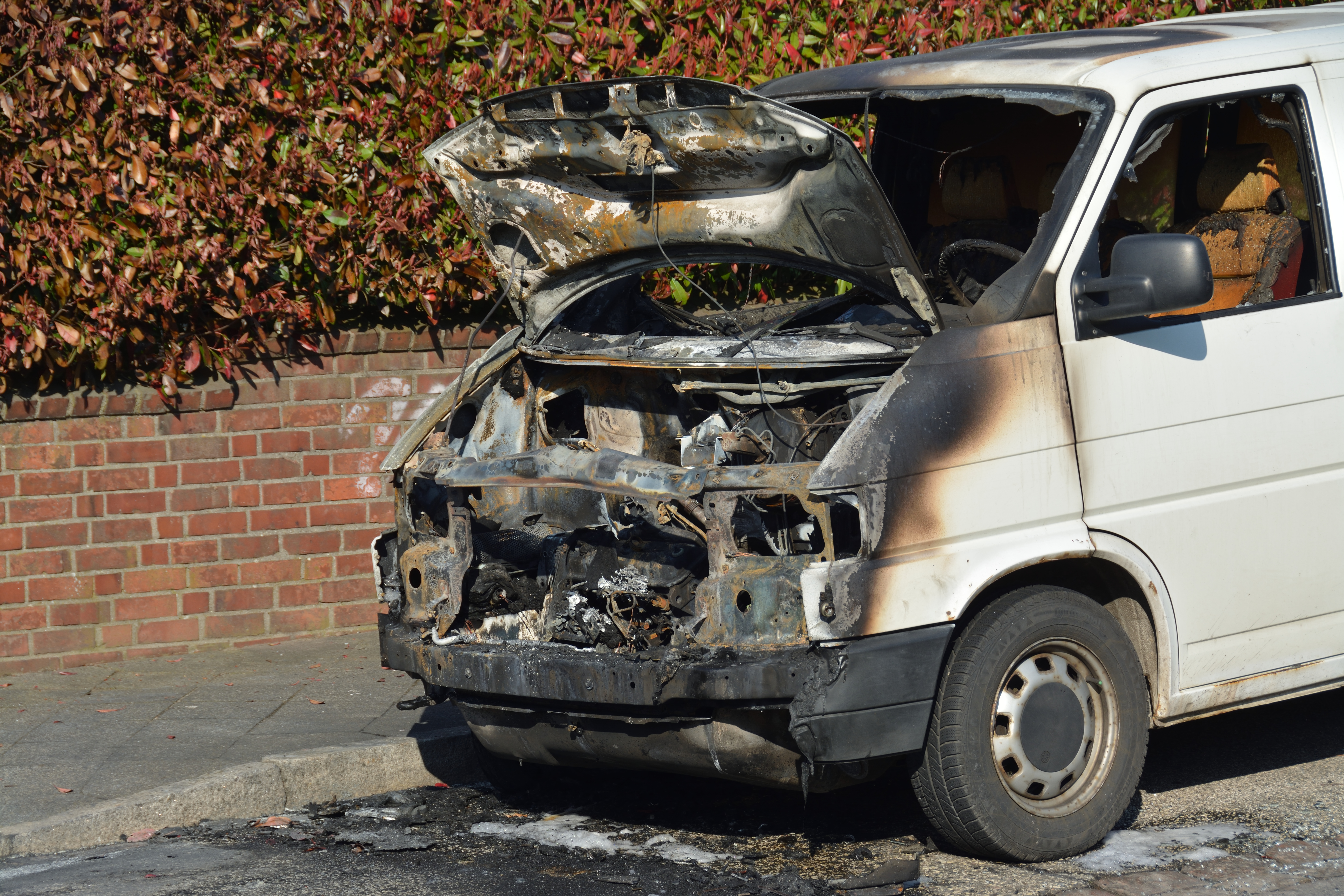 Ein Volkswagen T4 nach einem Motorbrand in Itzehoe. Weblink: [1]